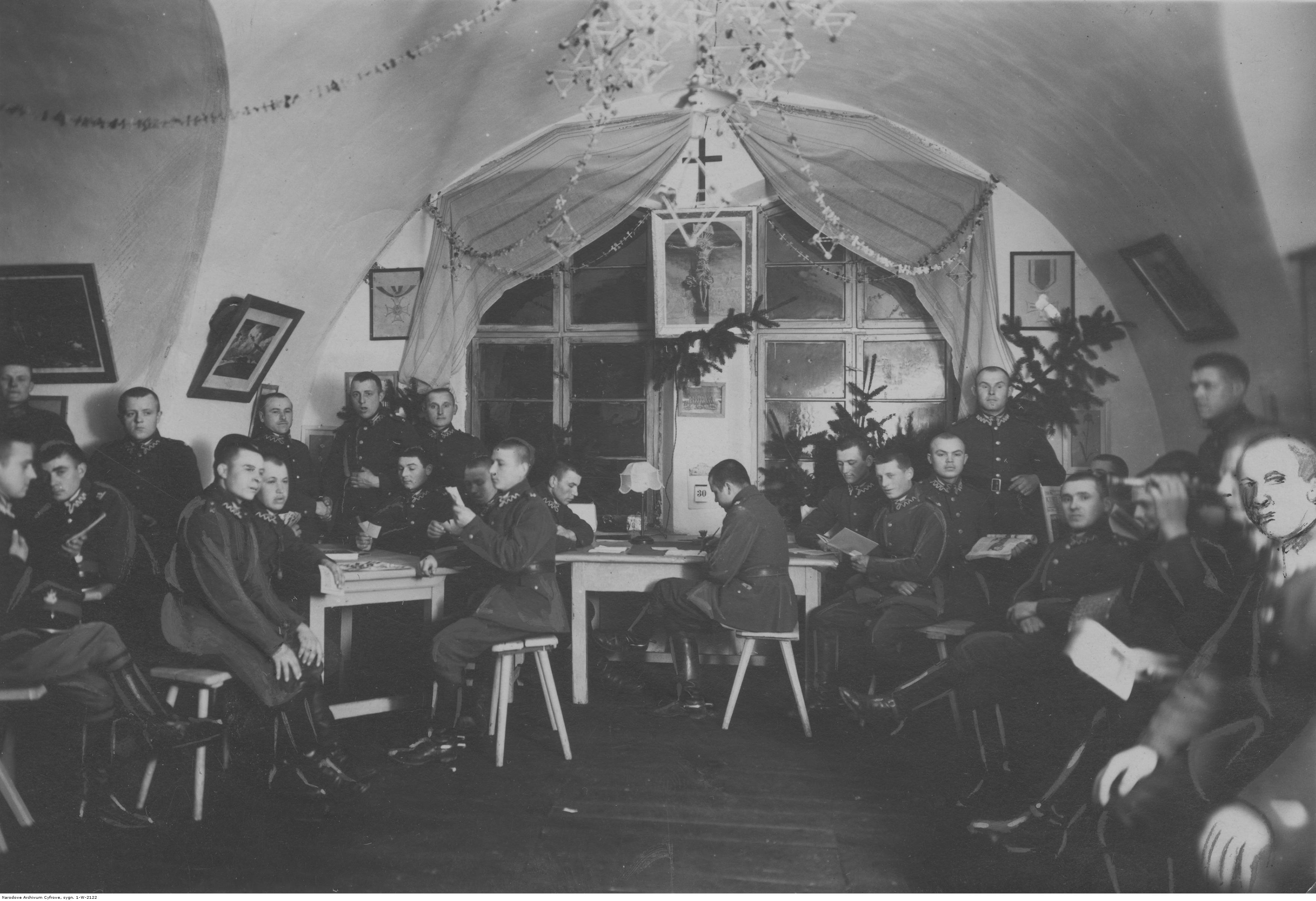 Świetlica Polskiego Białego Krzyża w szwadronie zapasowym 18 Pułku Ułanów Pomorskich z Grudziądza w Toruniu. Żołnierze szwadronu zapasowego 18 puł w nowej świetlicy, podczas zajęć świetlicowych. Koncern Ilustrowany Kurier Codzienny - Archiwum Ilustracji. Sygnatura: 1-W-2122